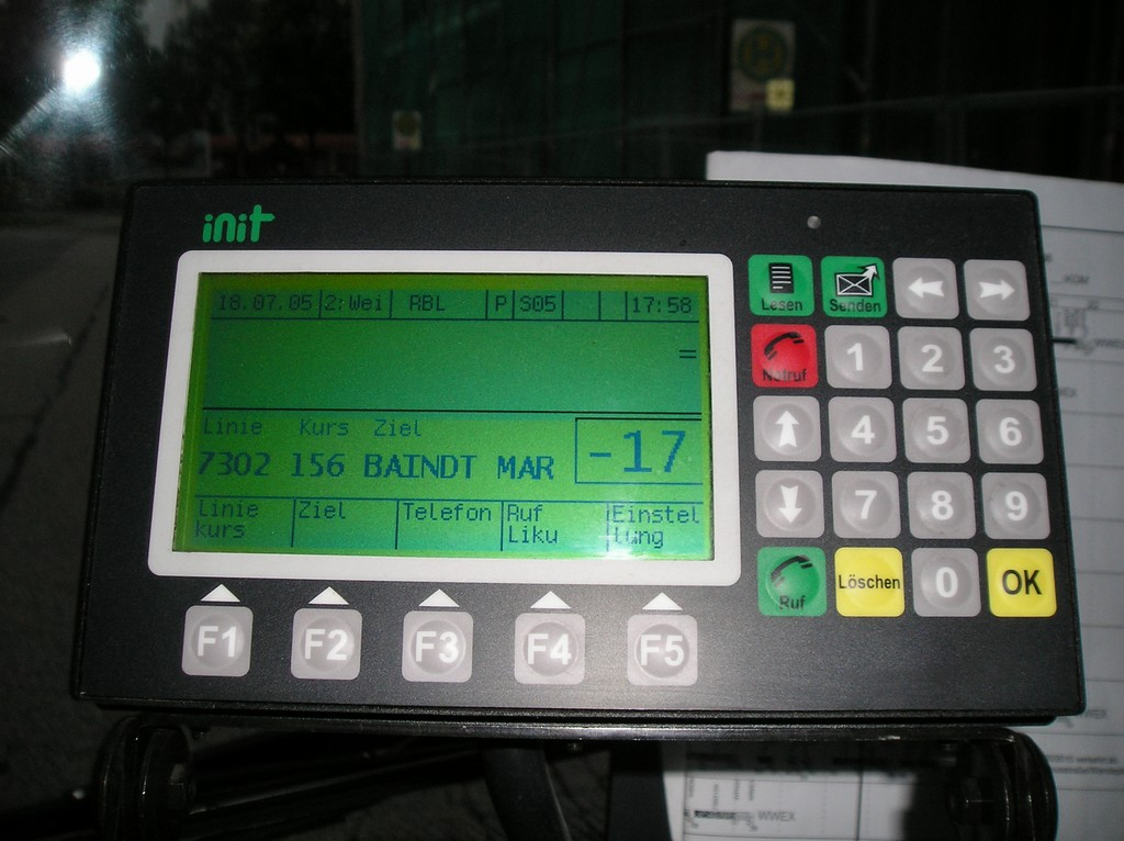 Init RBL-System des Regional Verkehr Alb Bodensee GmbH (RAB) Rechnergeschütztes Betriebsleitsystem (RBL) der DB ZugBus RAB.